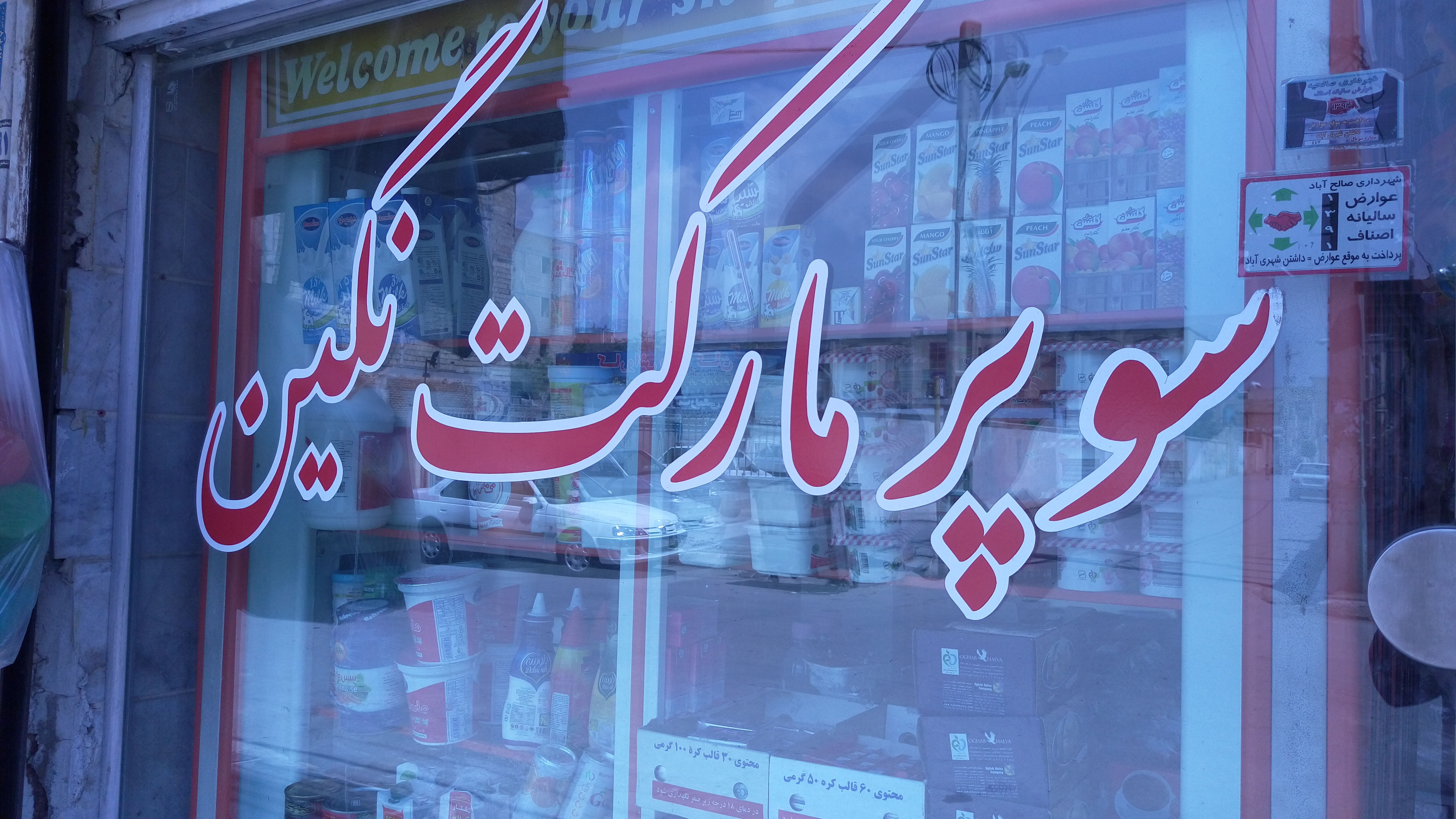 نماي قديمي از فروشگاه نگين(برادران ياري)